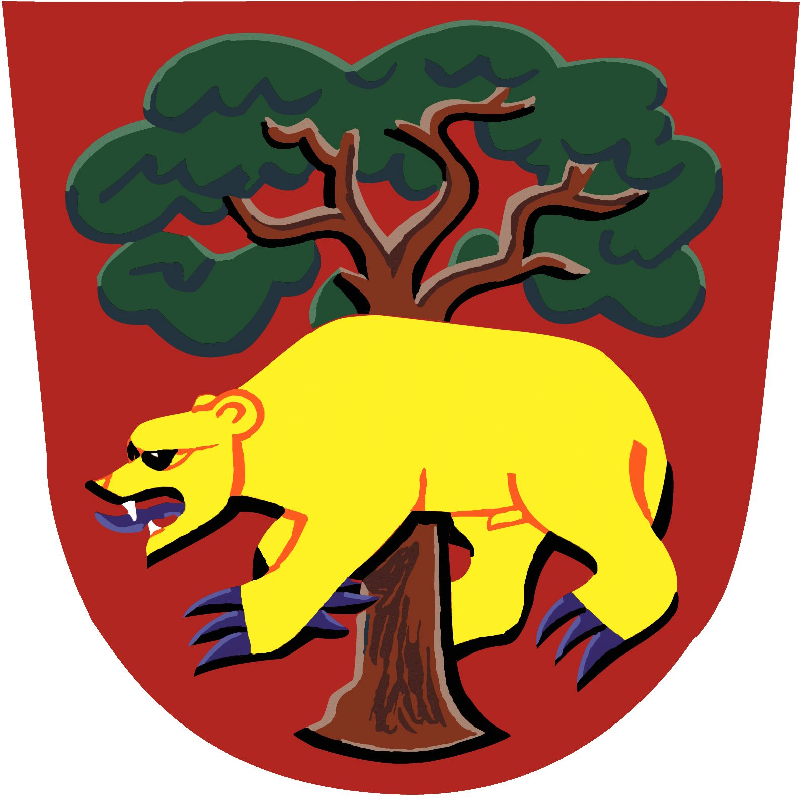 Znak Stárkova